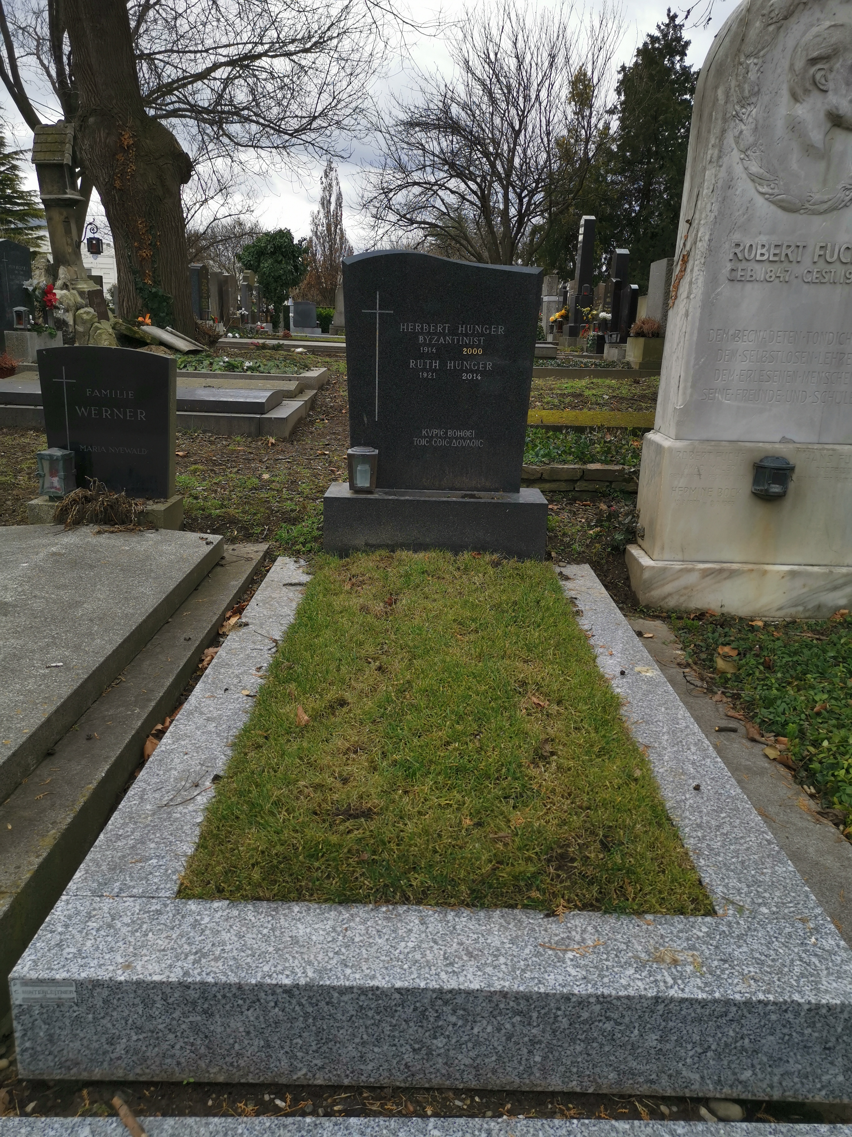 Grab von Herbert Hunger auf dem Wiener Zentralfriedhof